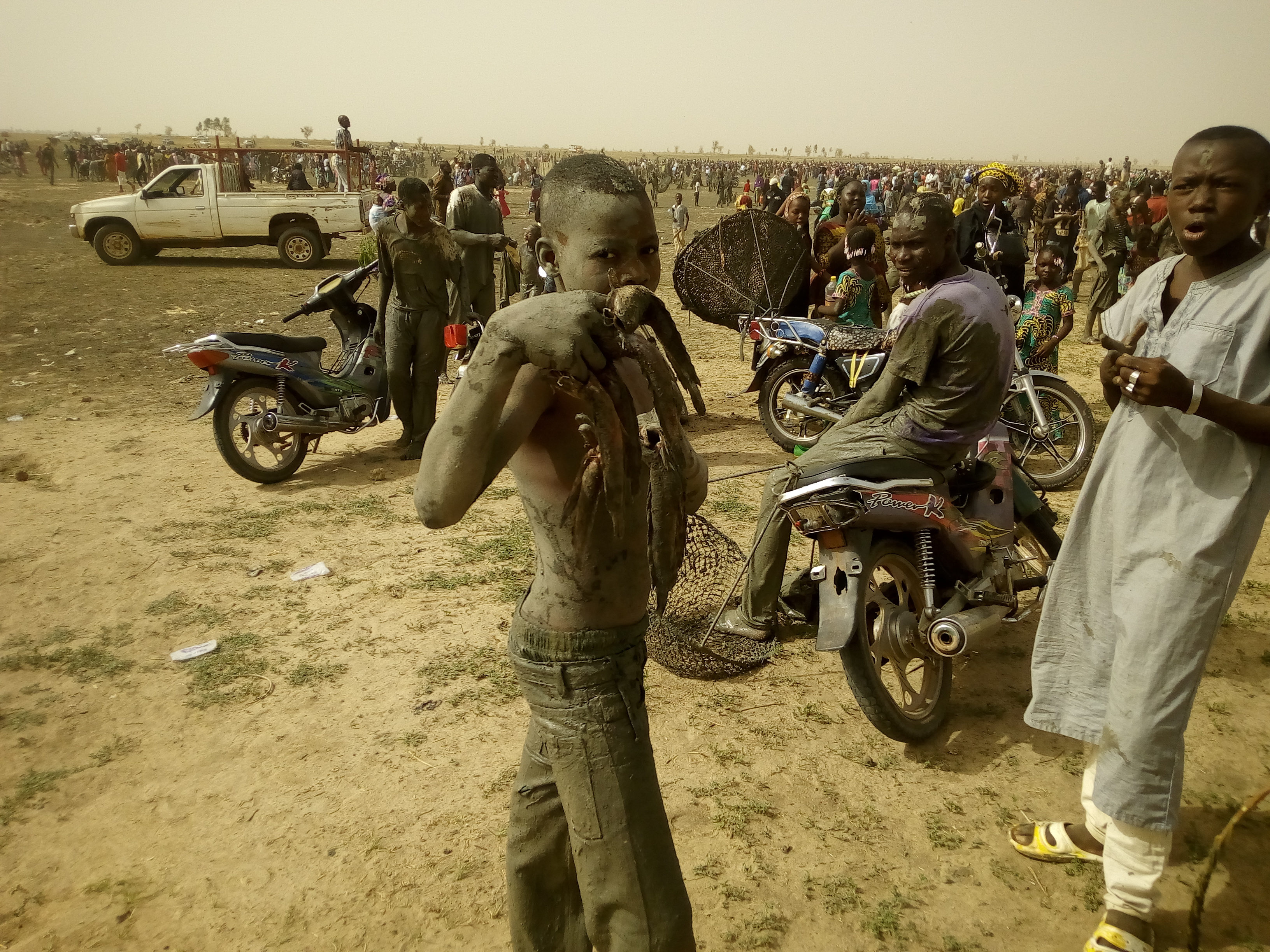 Concours wikichallenge écoles d'afrique 2019